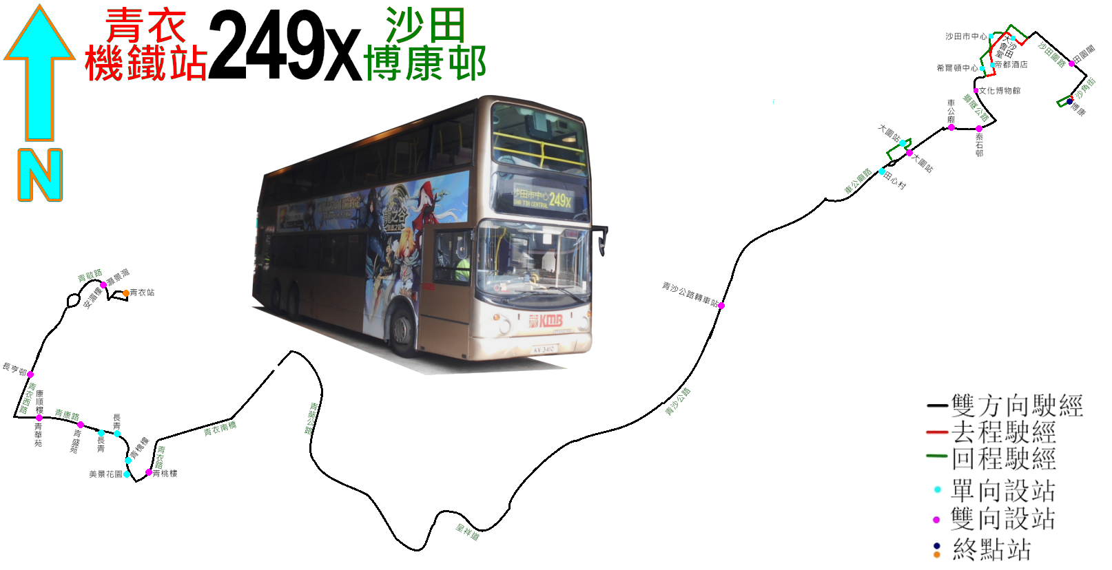 中文（香港）: 九巴249X線的走線圖